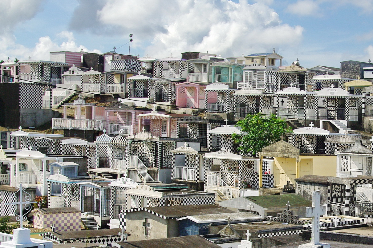 Friedhof von Morne-à-l'Eau, Guadeloupe